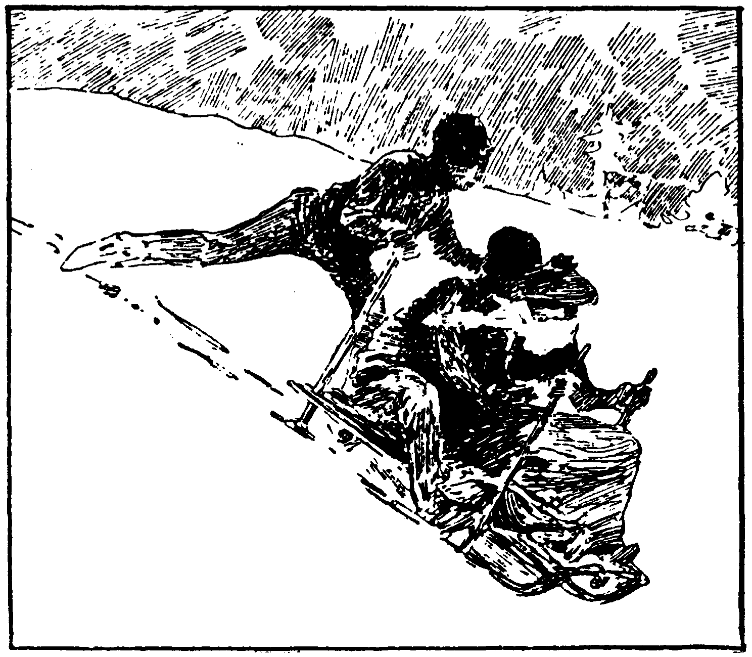 Drög. Bild från Nordisk Familjebok, band 15, sp 556, Uggleupplagan. Artikeln "Kälkåkning".